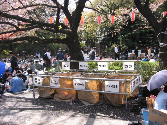 Mülltrennung bei einem Kirschblütenfest in Tokyo.